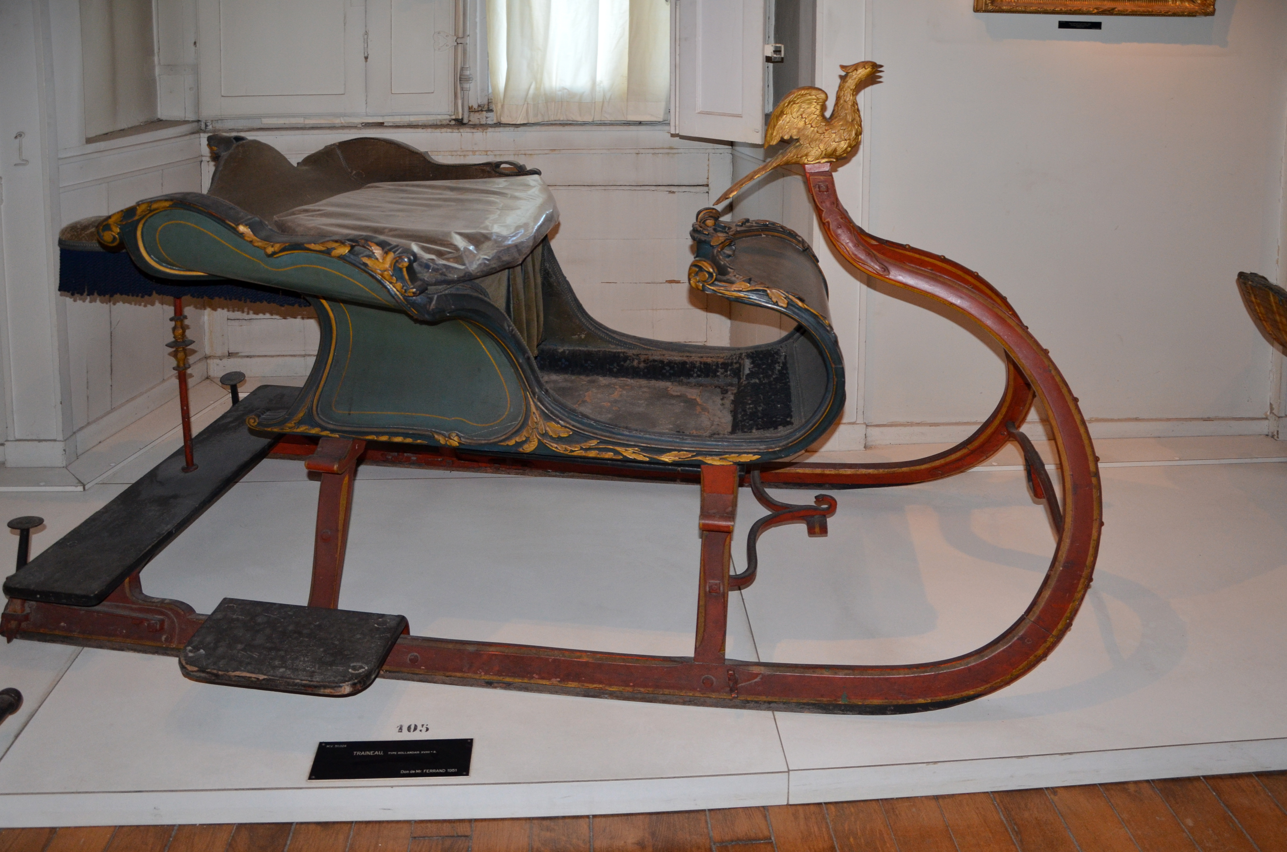 Musée National de la Voiture et du Tourisme à Compiègne, Oise, Picardie, France